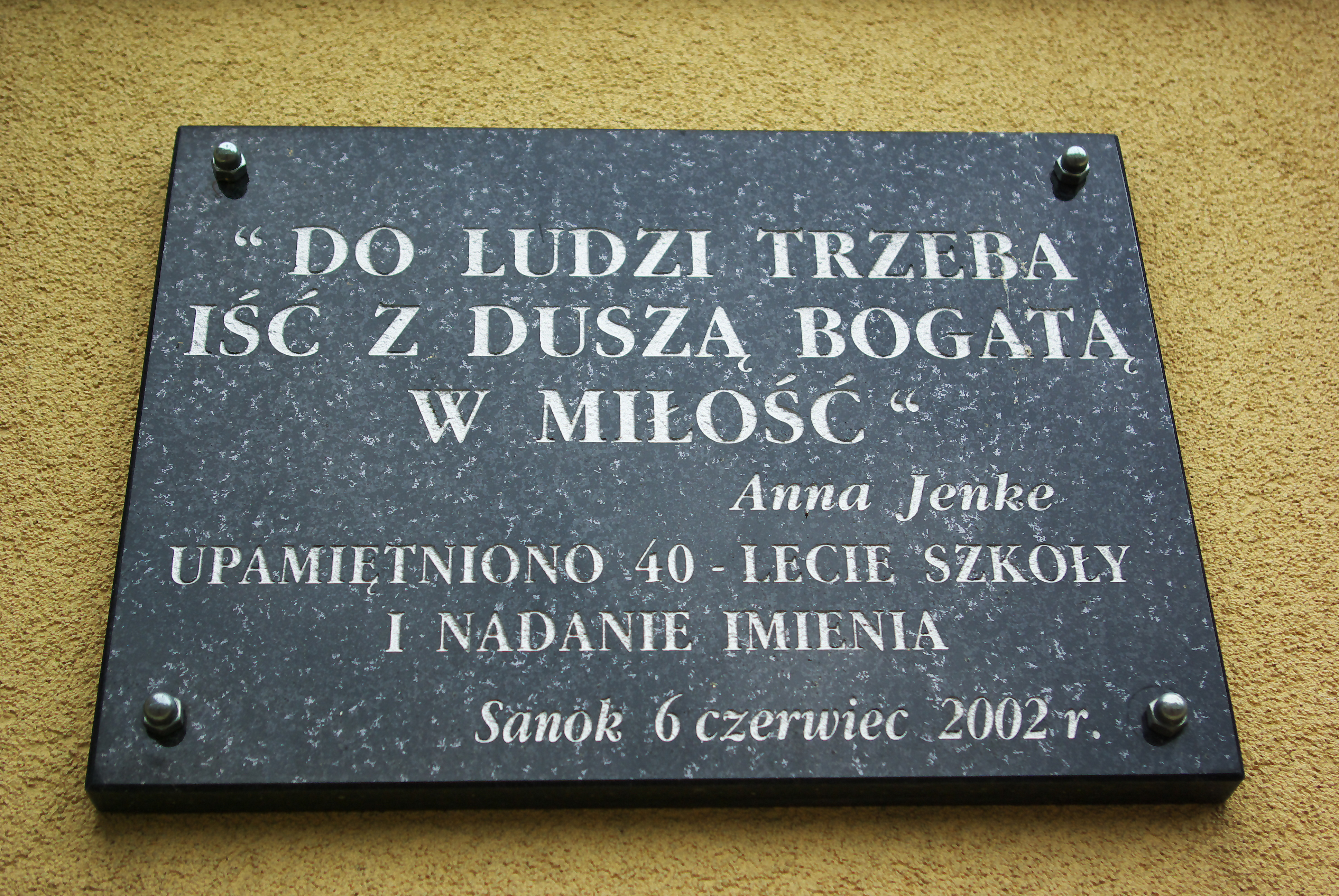 Tablica upamiętniająca Annę Jenke - Medyczna Szkoła Policealna im. Anny Jenke w Sanoku